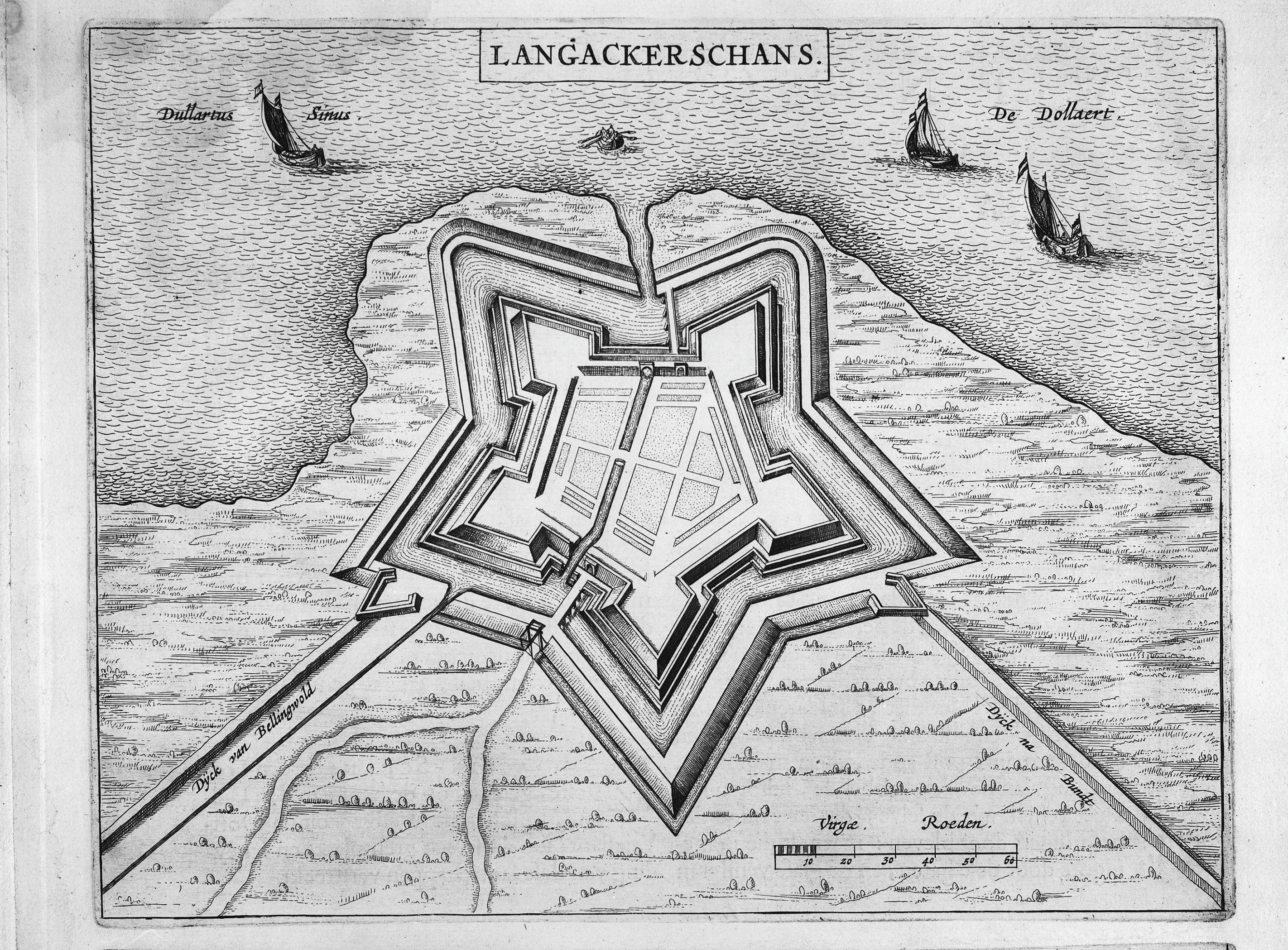 plattegrond van J.Blaeu, reproductie uit album Rijksdienst voor de Monumenten Zorg te Zeist